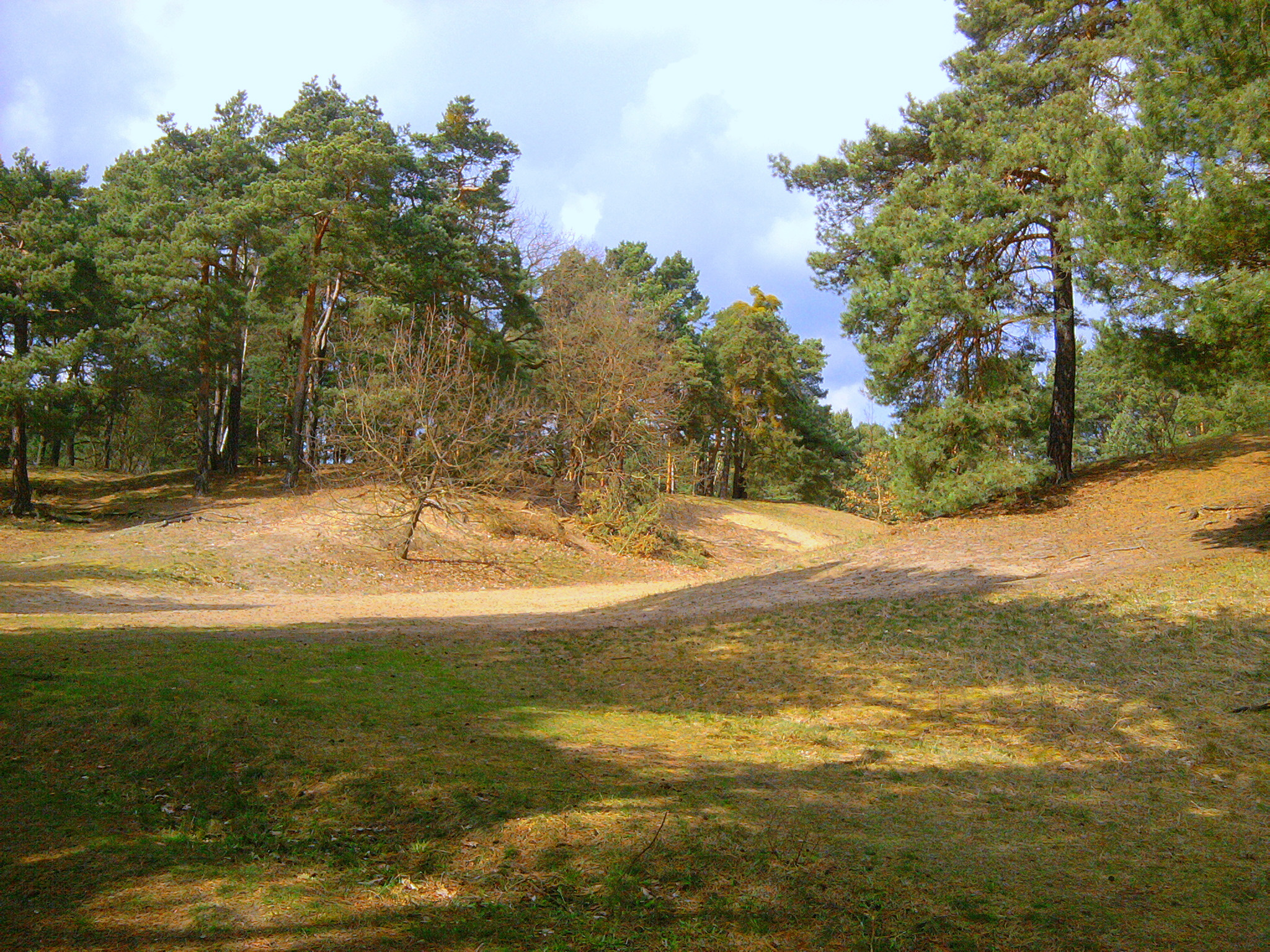 Püttberge, NSG Wilhelmshagen-Woltersdorfer Dünenzug